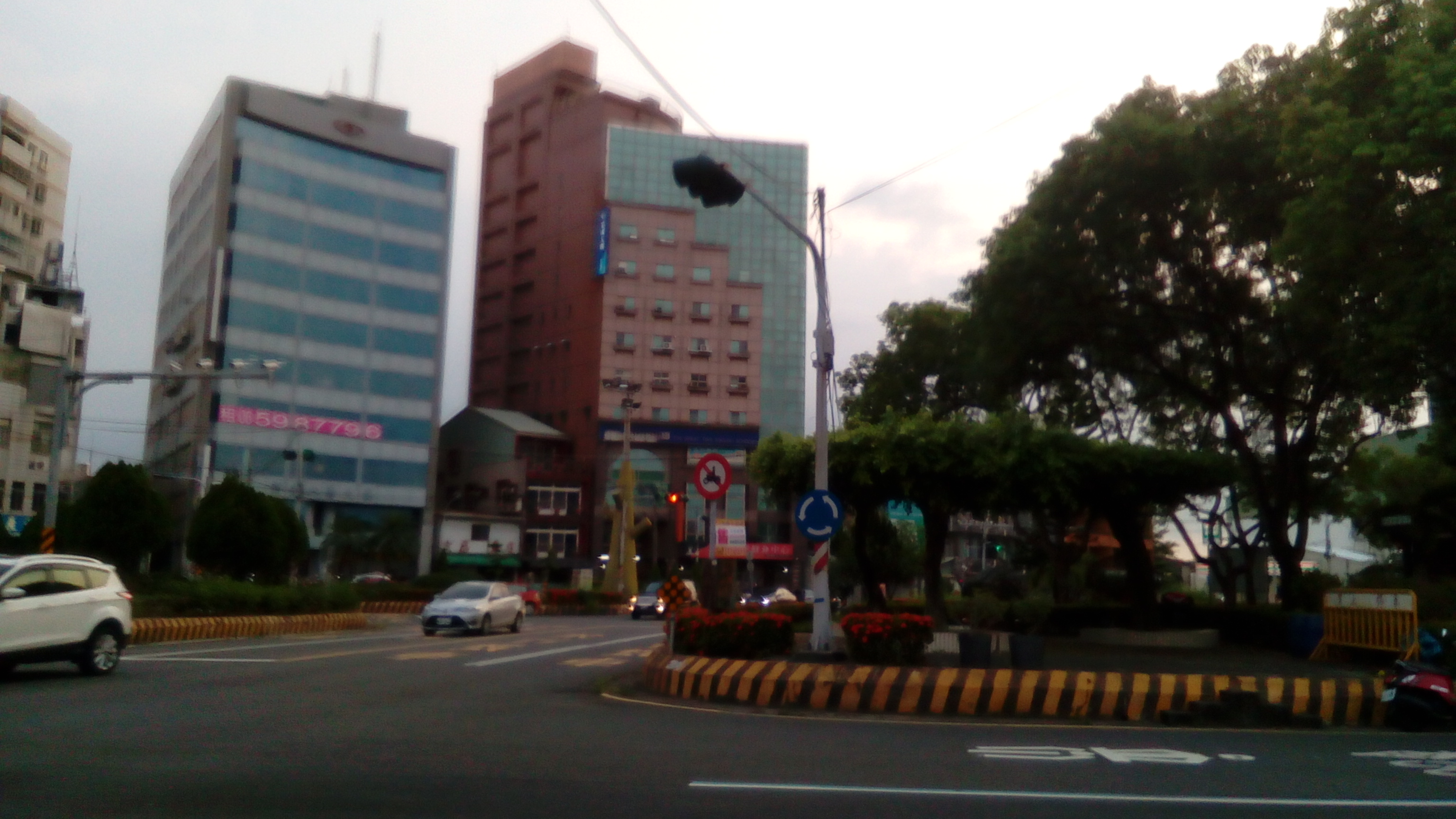 位於台20線及大新路口